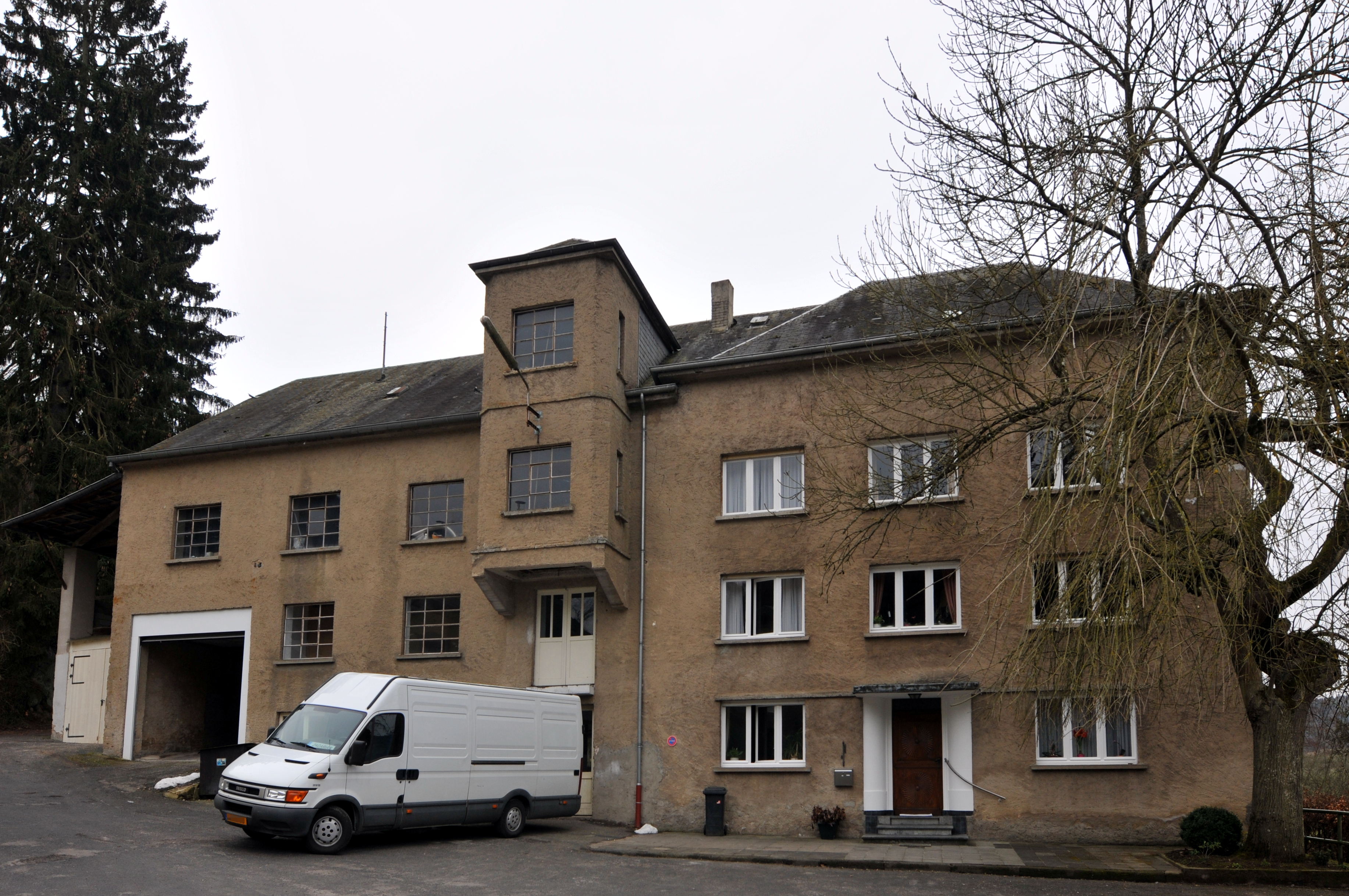 D'Brichermillen bei Mutfert.